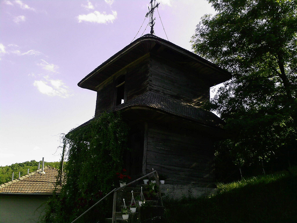 sat Pârveşti; comuna Costeşti